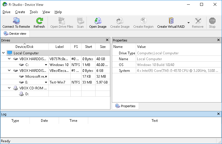 RStudio